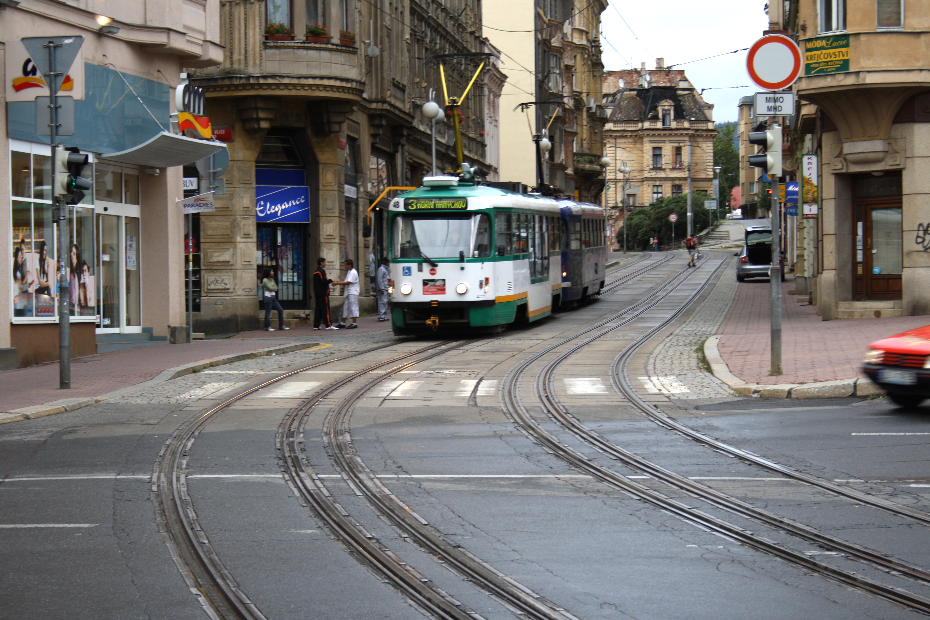 Liberec-Staré Město, ul. 5. května, od Šaldova náměstí.